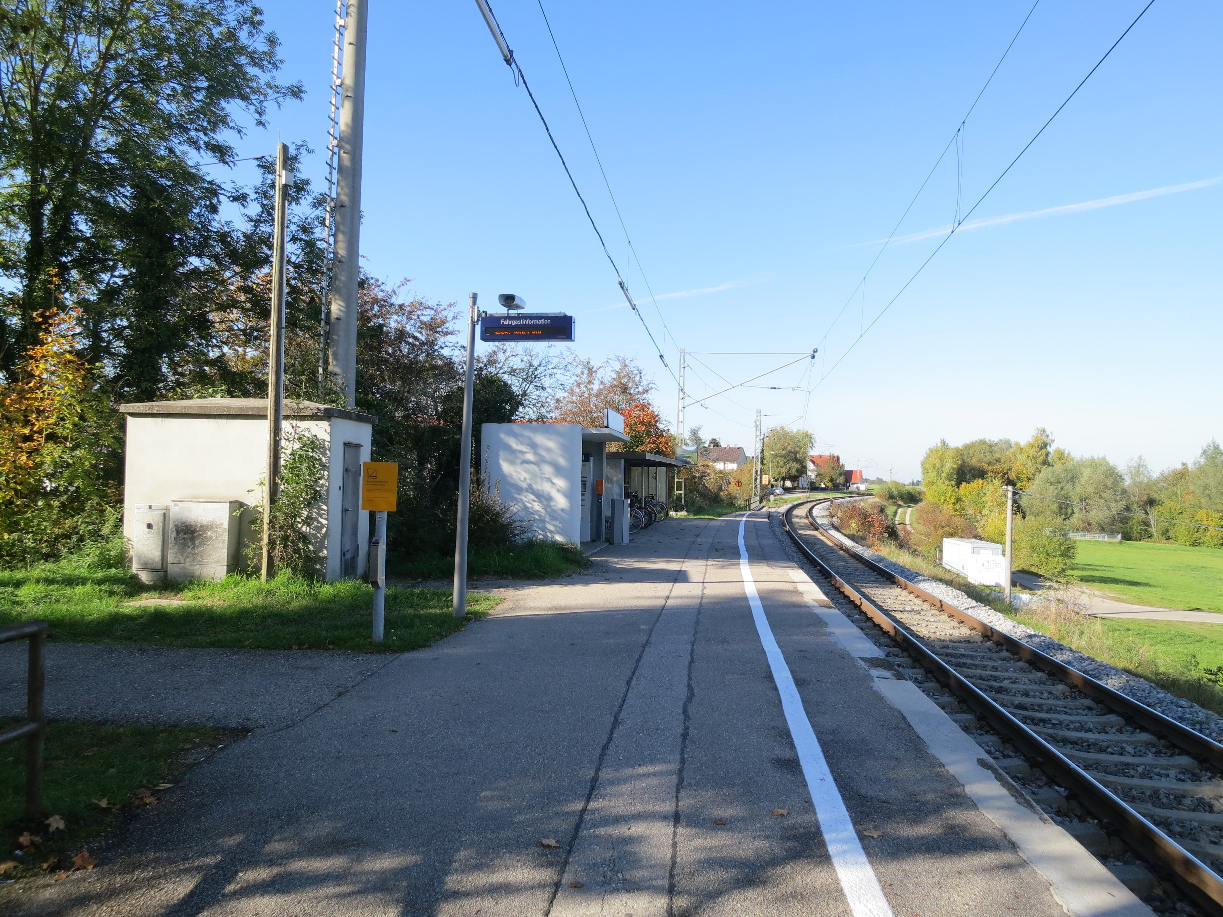 Hausbahnsteig des Bahnhofs Schmiechen (Schwab) an der Ammerseebahn